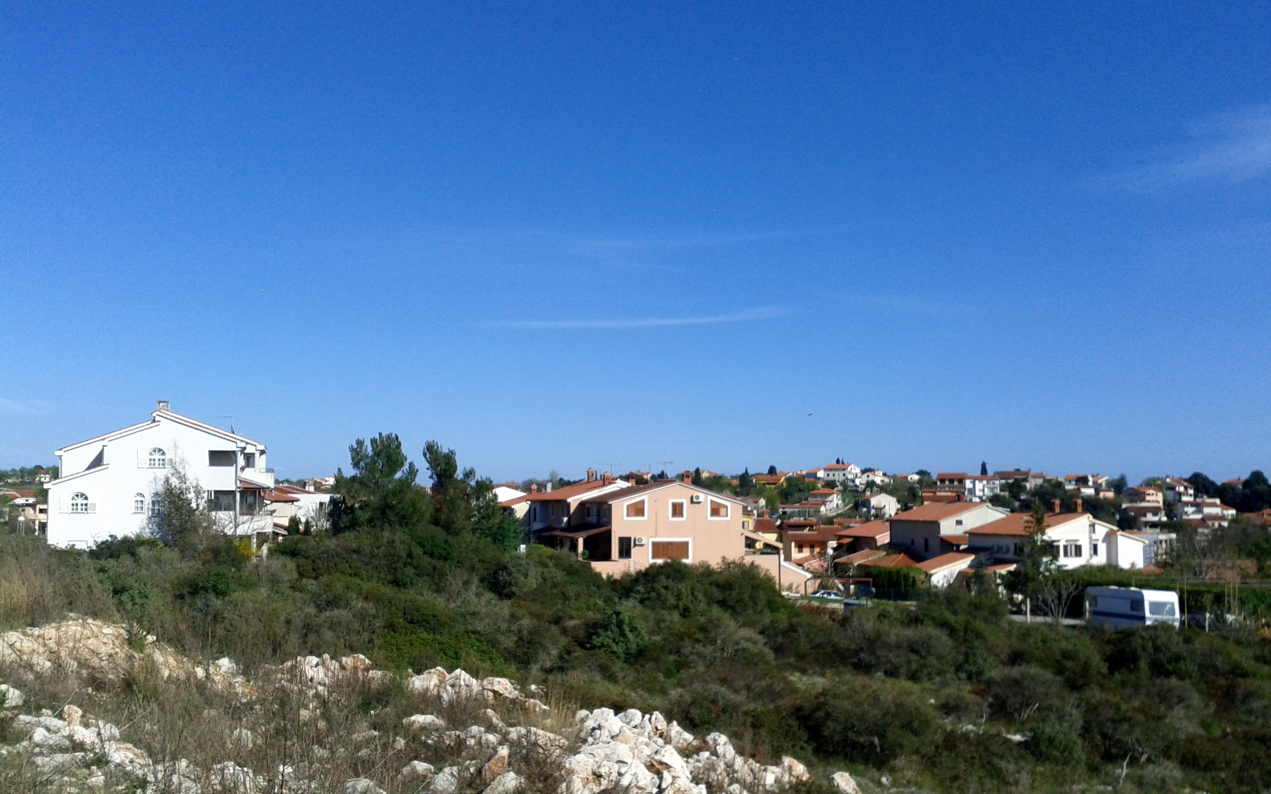 vinkuran bay 6